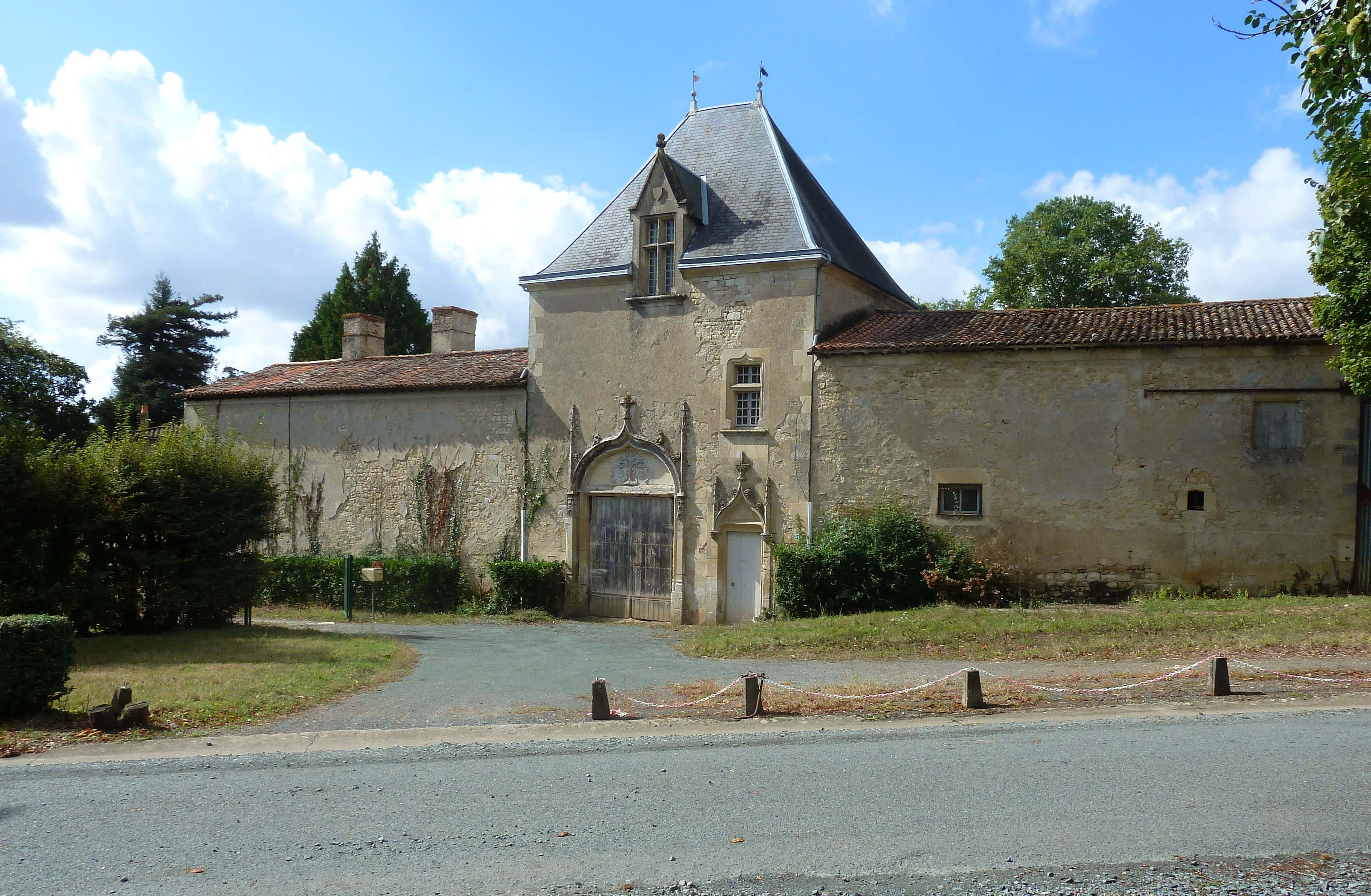 St Michel le Cloucq - Château du bourg - Porche d'entrée